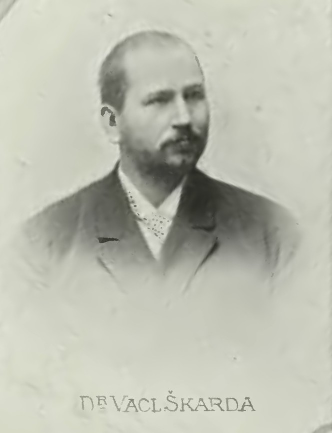 Portrét – Václav Škarda (1861-1912), Český právník a politik.